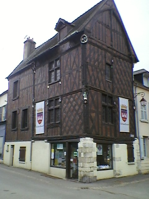 La Maison Jeanne D'Arc, rue Aristide Briant à Château-Renard. Elle abrite actuellement les bureaux du Syndicat d'Initiative.